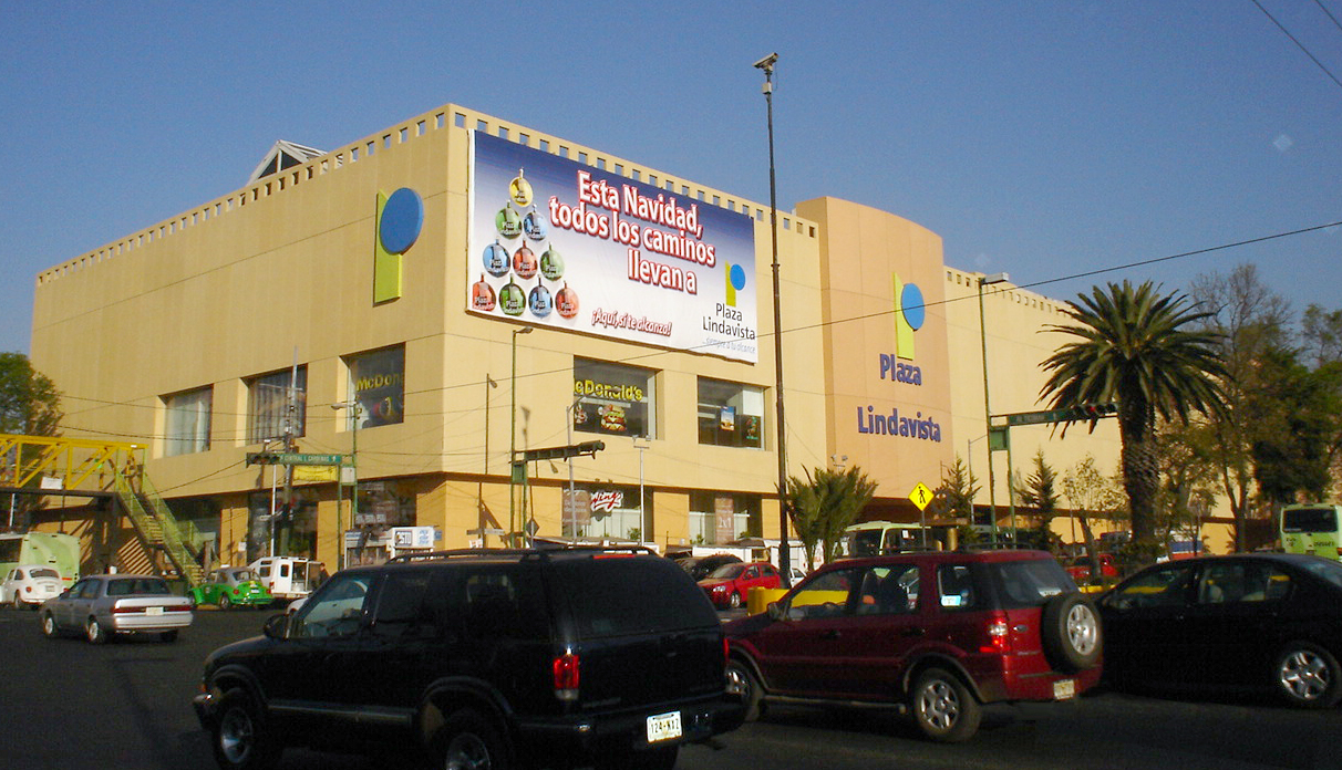 Plaza Lindavista en la intersección de las avenidas Montevideo e Instituto Politécnico Nacional en la colonia Lindavista de la Ciudad de México